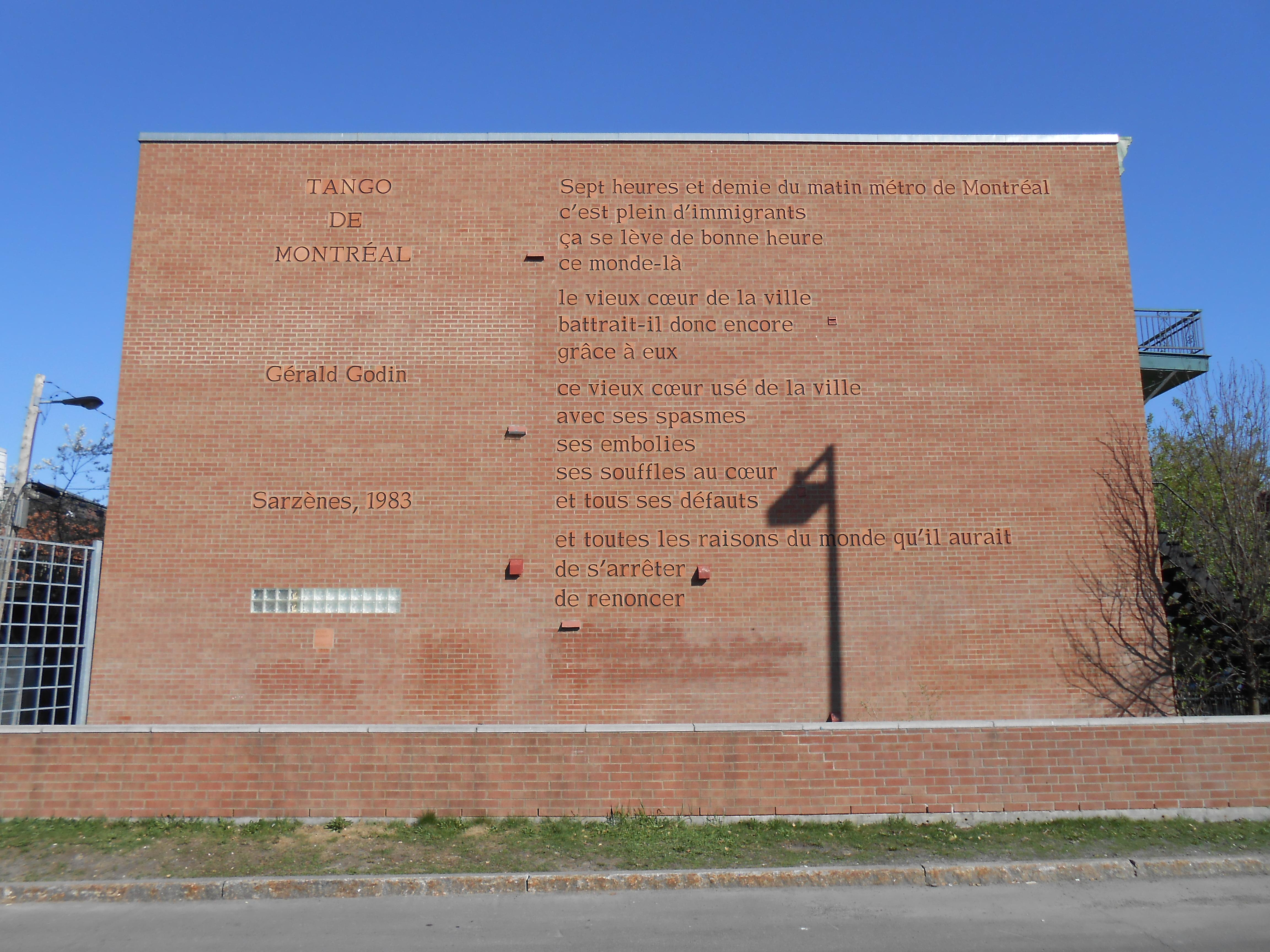 Tango de Montréal, poème de Gérald Godin, sur un mur de Montéal, près de la station de métro Mont-Royal Le poème Tango de Montréal de Gérald Godin a été reproduit sur le mur nord de la maison portant l'adresse civique 4433, rue Rivard, par Richard Purdy.